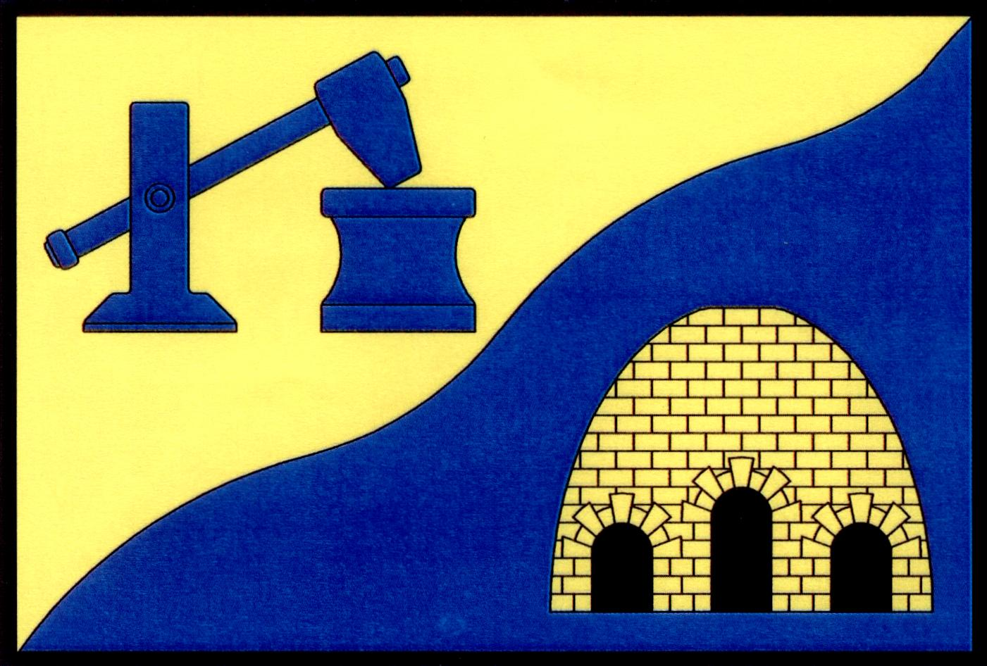 Vlajka obce Mokrovraty.